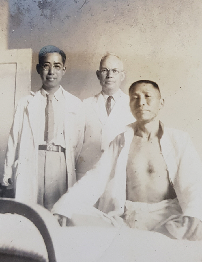 대한민국 임시정부 김구 주석 (1938년 총탄을 맞고 수술 후)